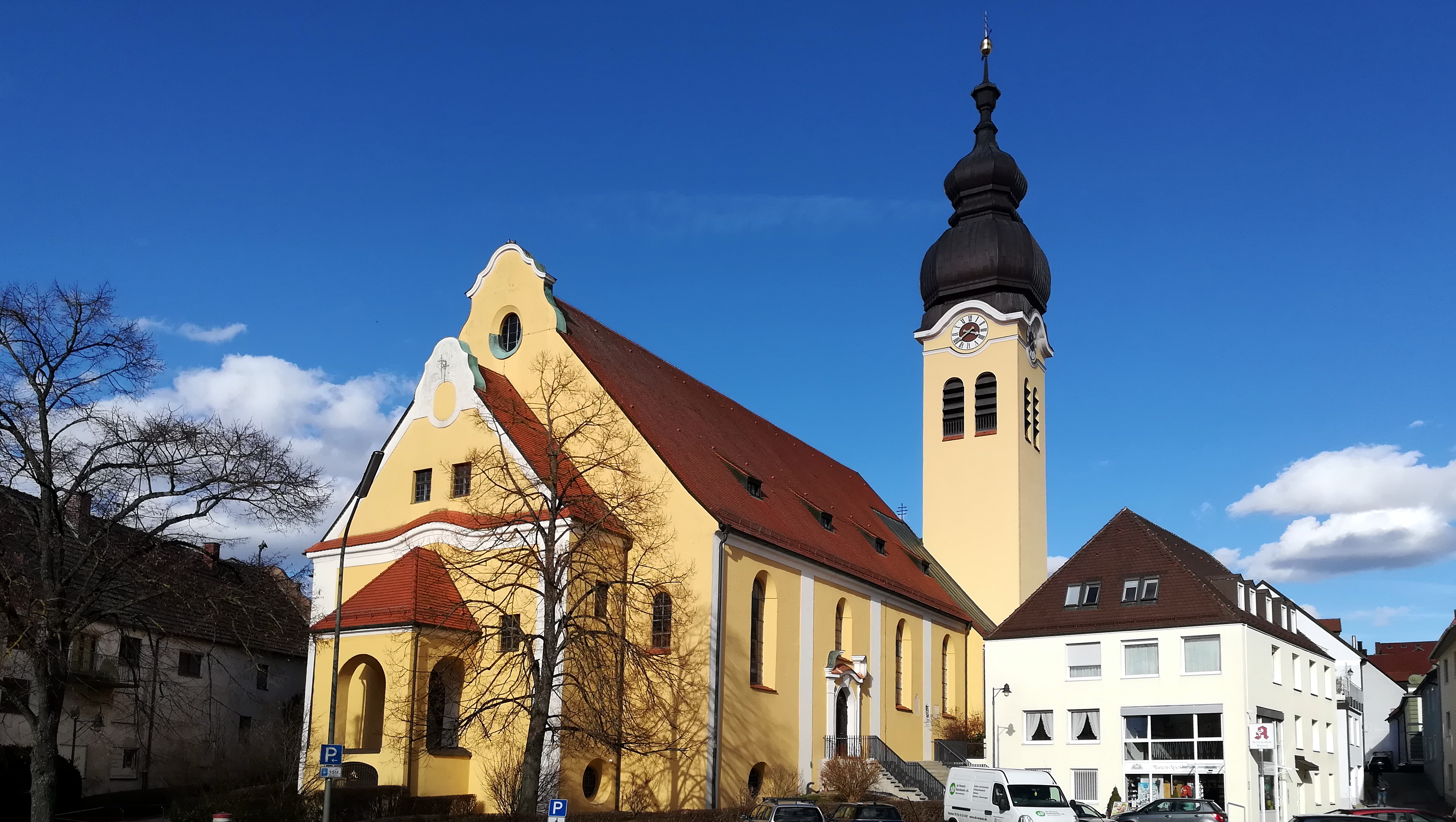 St. Laurentius ist eine katholische Pfarrkirche in Wolnzach, einem Markt im oberbayerischen Landkreis Pfaffenhofen an der Ilm.